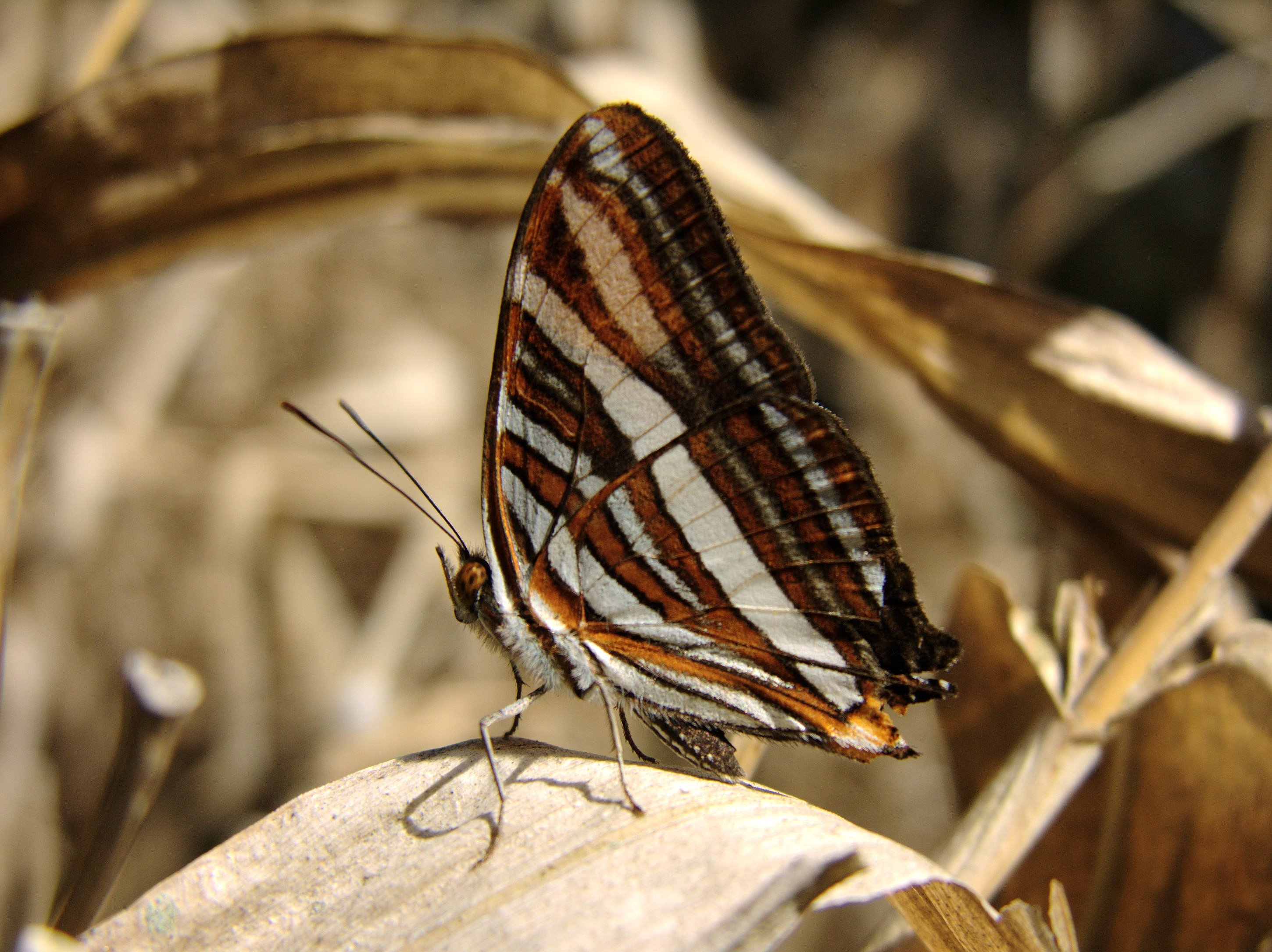 Adelpha syma (Nymphalidae, Limenitidinae), Curitiba, Brasil.